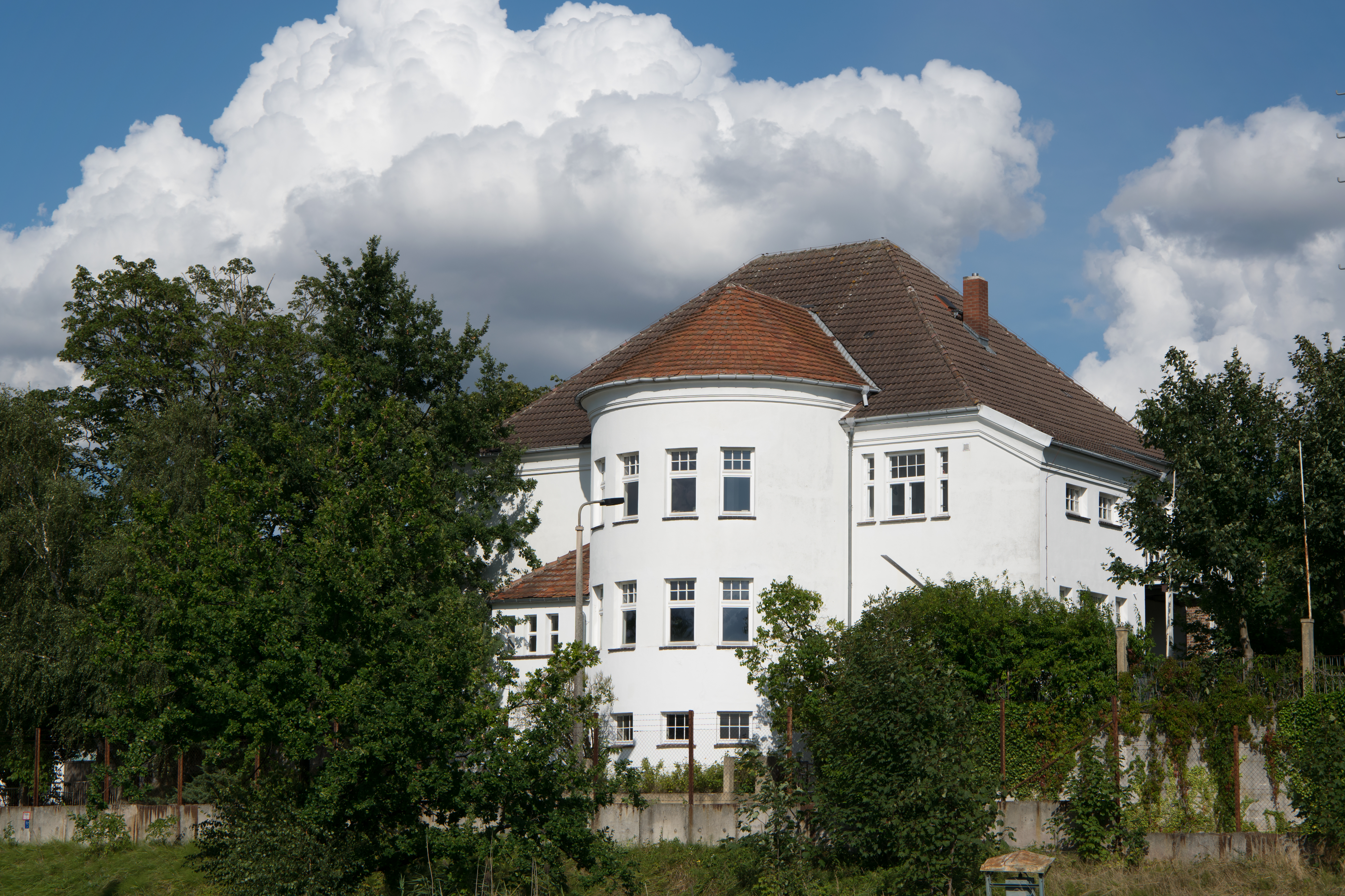 Schwaan Niendorfer Chaussee 2